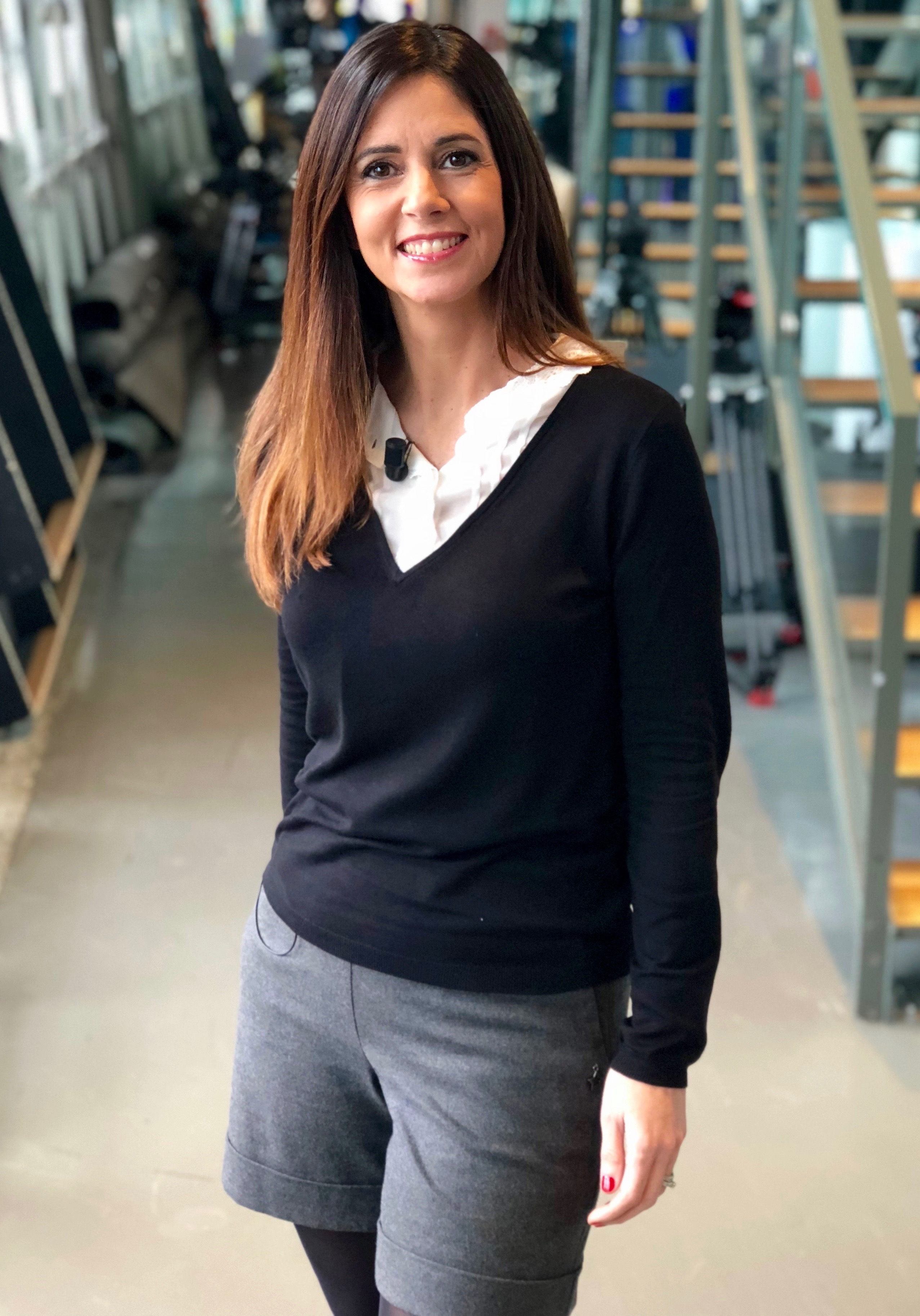 coulisse TV